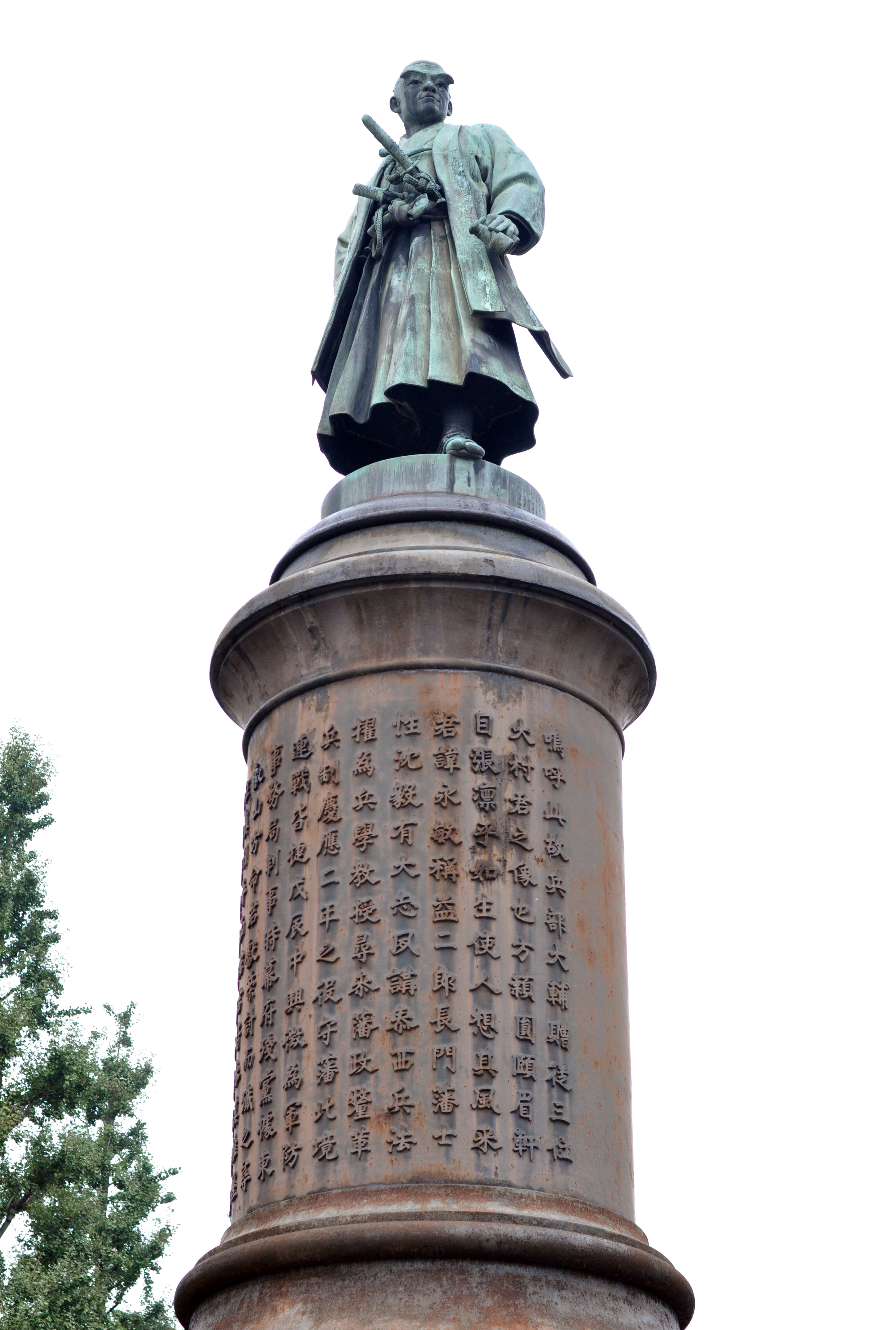 靖国神社にある大村益次郎の像